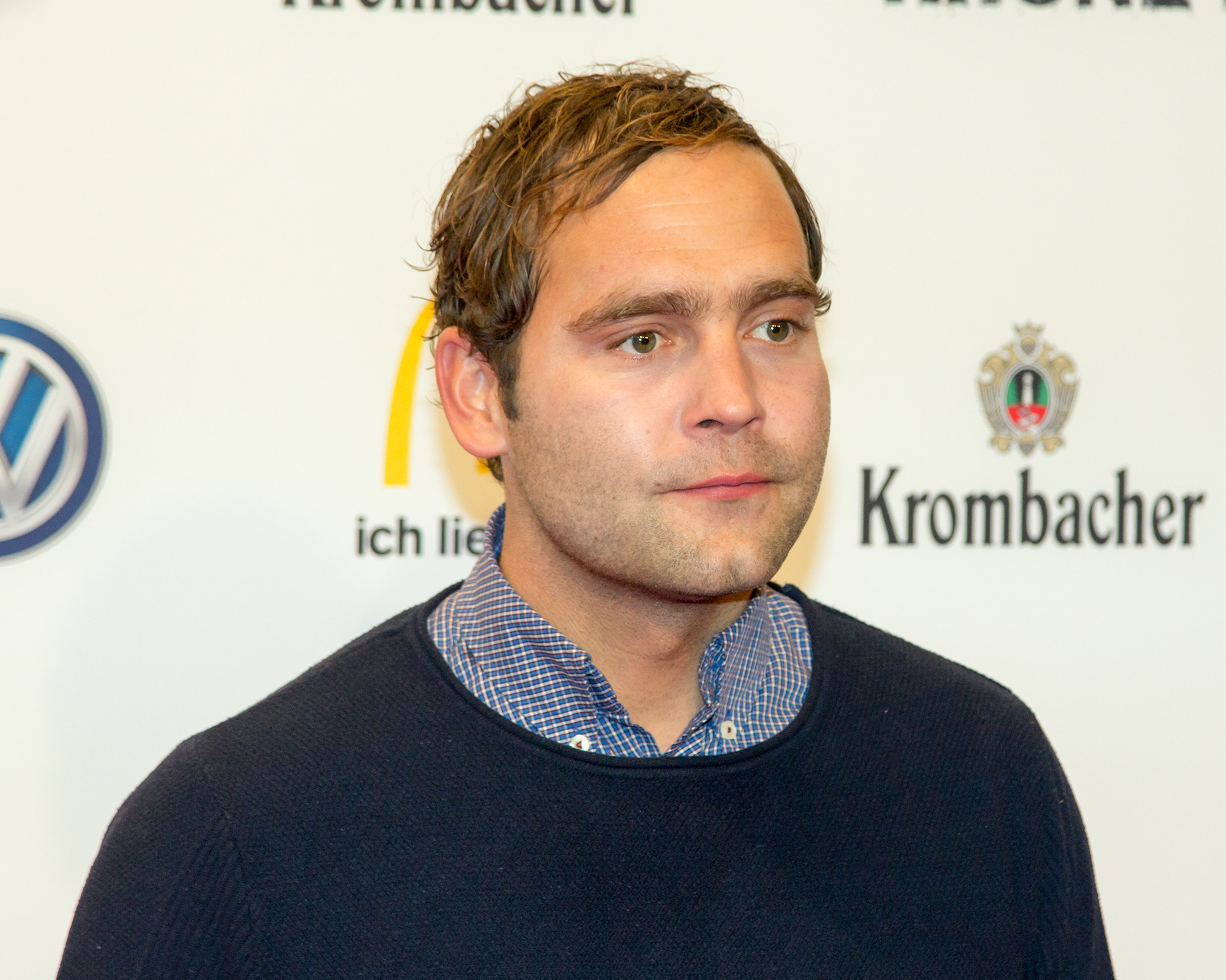 1LIVE Krone 2014 in der Bochumer Jahrhunderthalle: Bosse auf dem roten Teppich